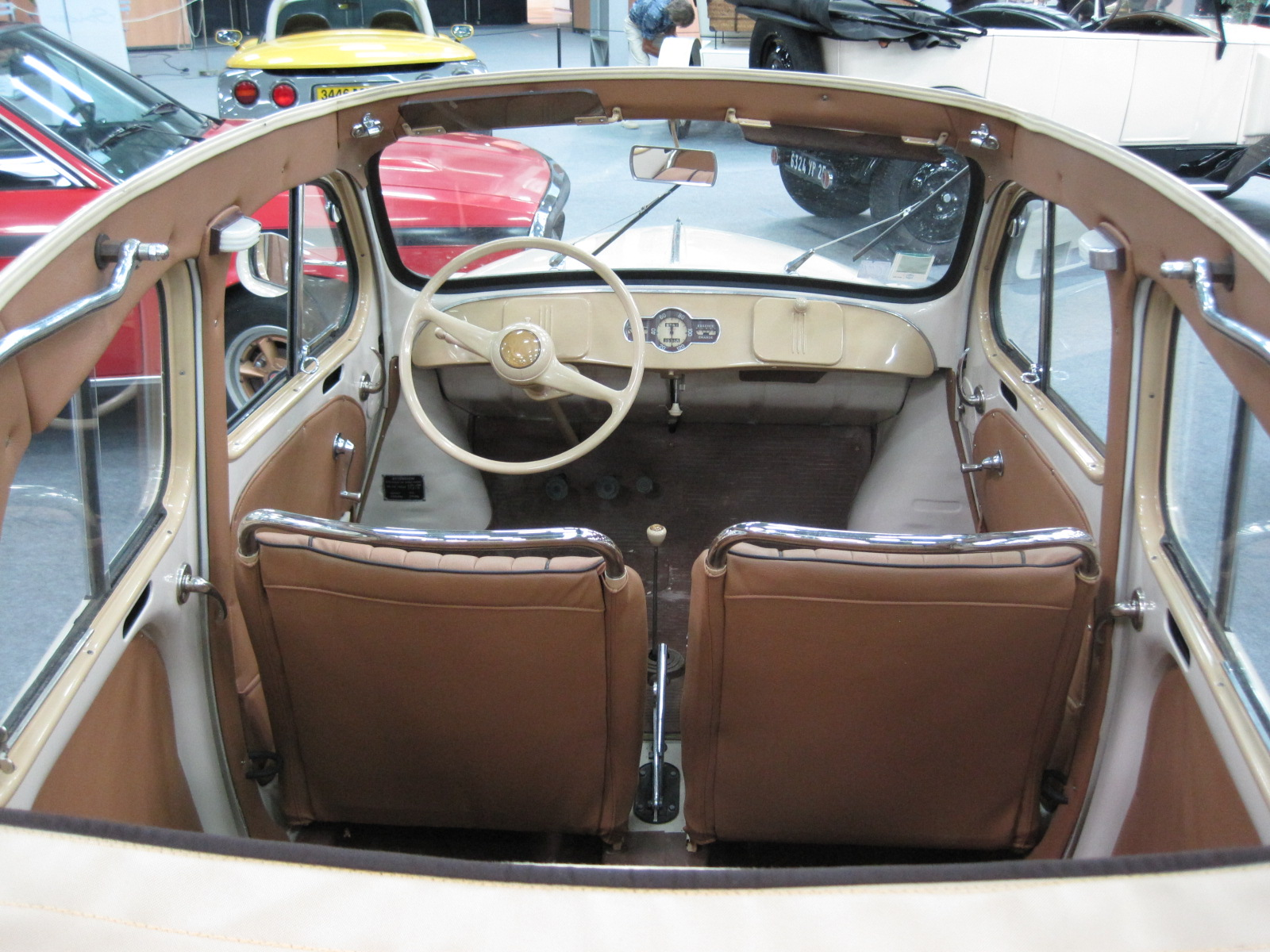 Interieur Renault 4CV découvrable